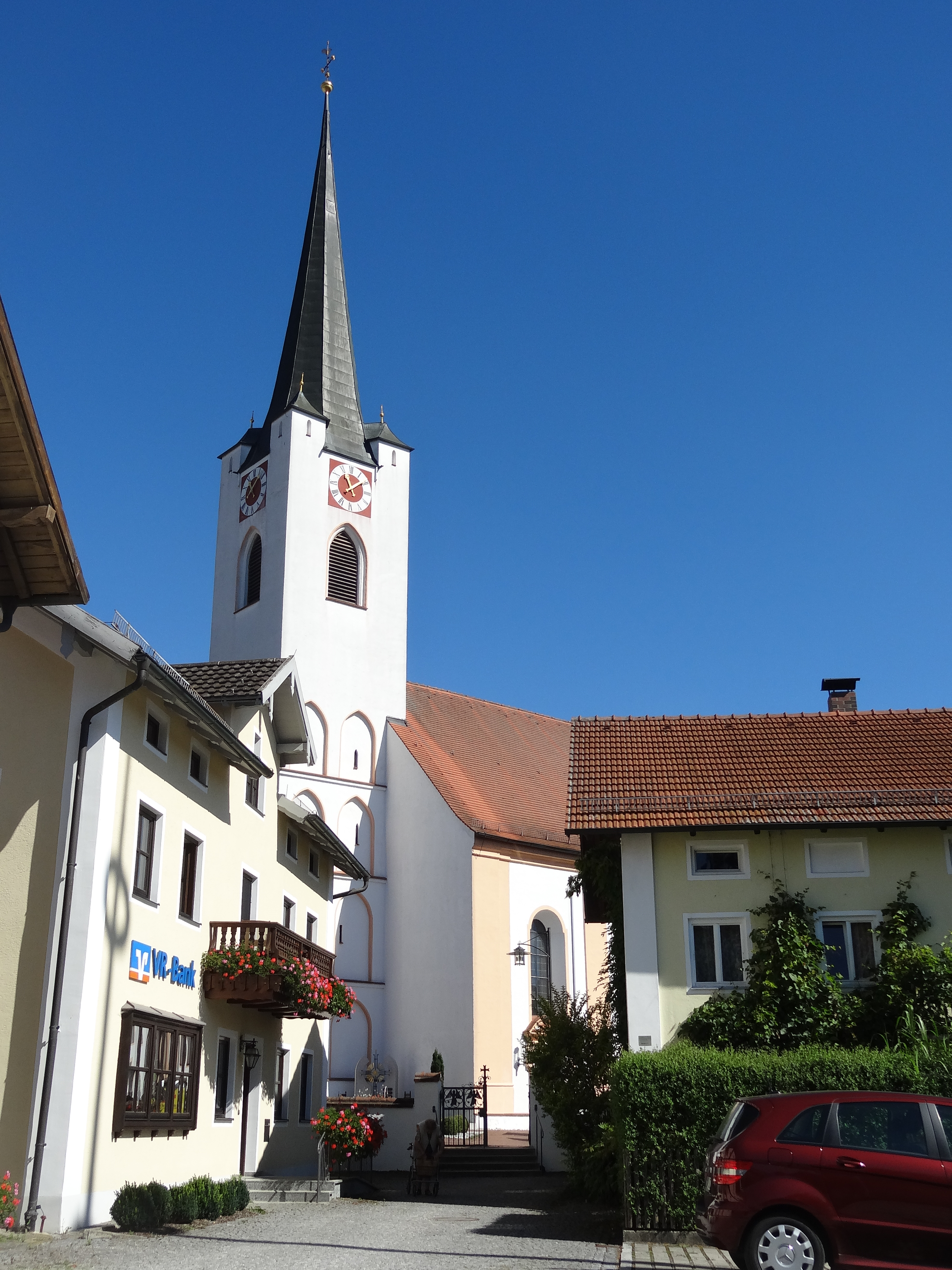 Kath. Pfarrkirche St. Johann Baptist in Binabiburg (Gde. Bodenkirchen, Lkr. Landshut, Bayern)